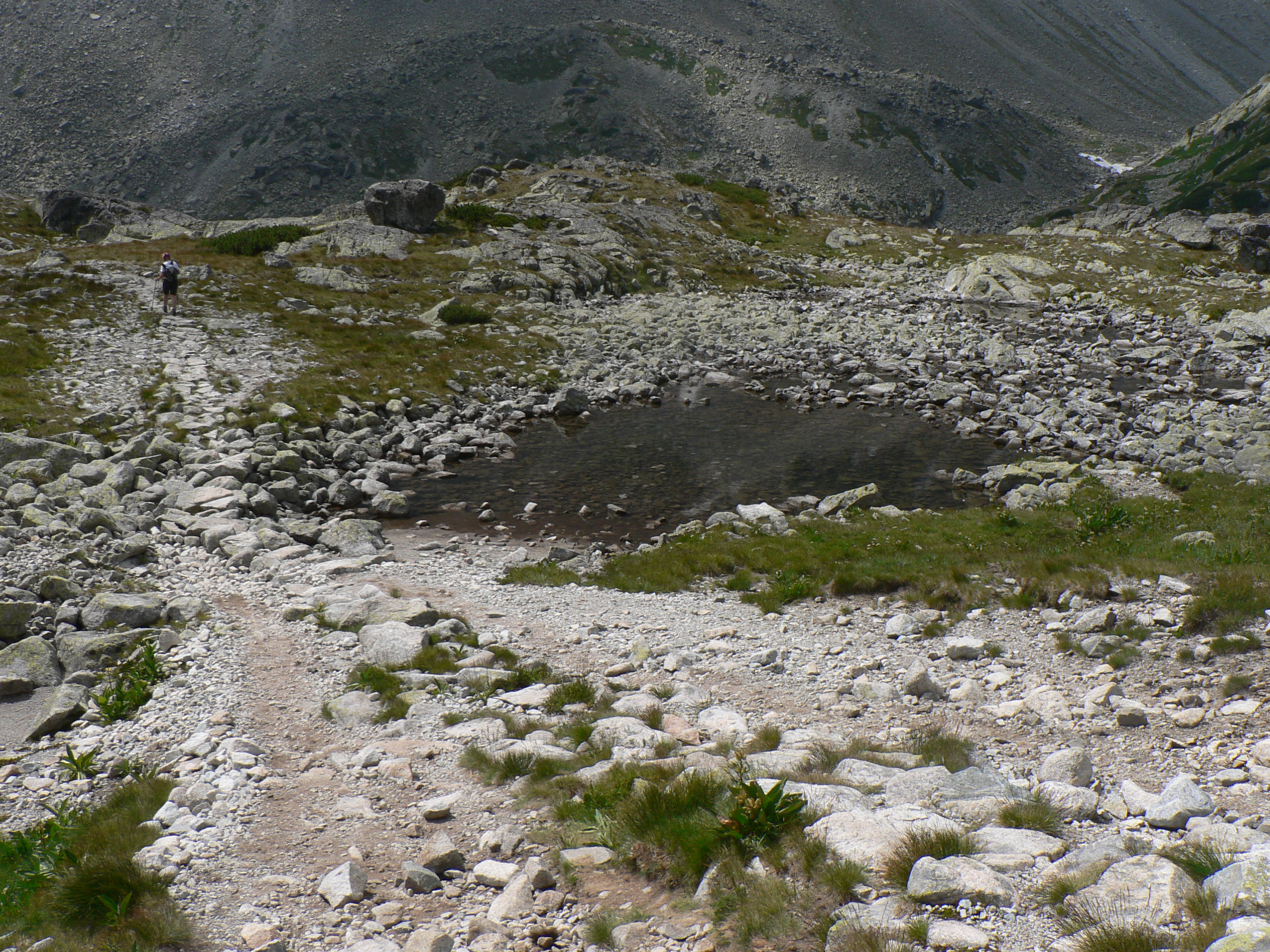 Niżnie Harnaskie Oko — Veľká Studená dolina, Vysoké Tatry, Tatranský národný park, Slovensku.